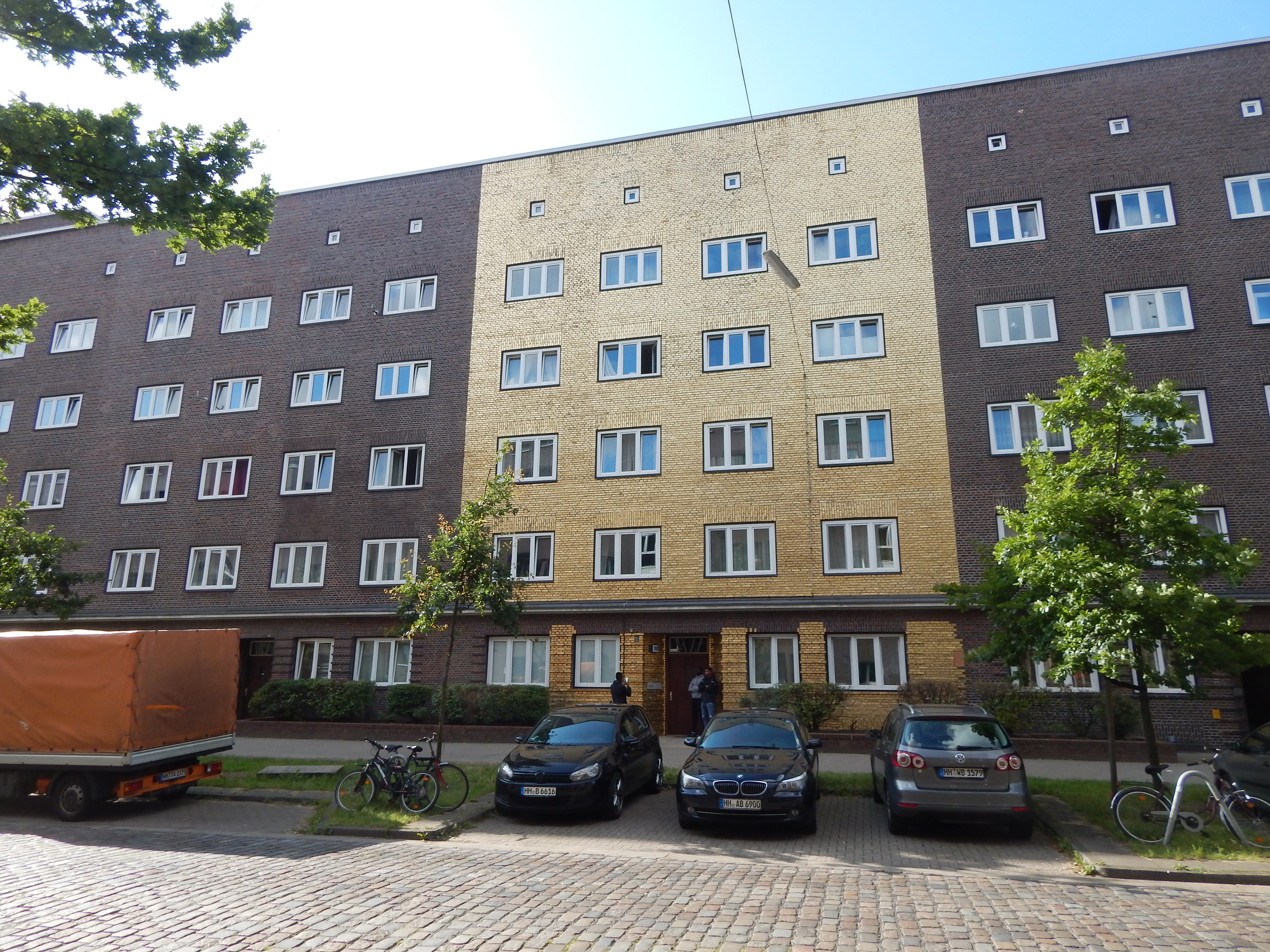 Das Gold-Haus